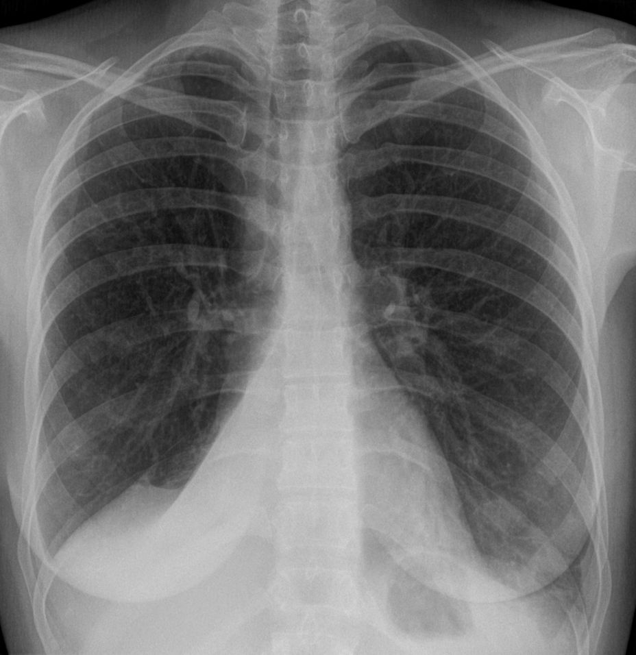 Atelektase des rechten Unterlappen in der pa-Übersichtsaufnahme des Thorax.